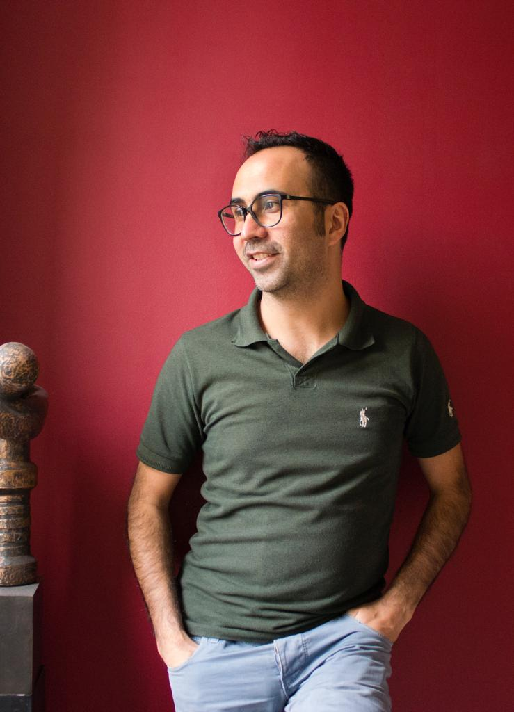 مهدی فاتحی در استودیوفا